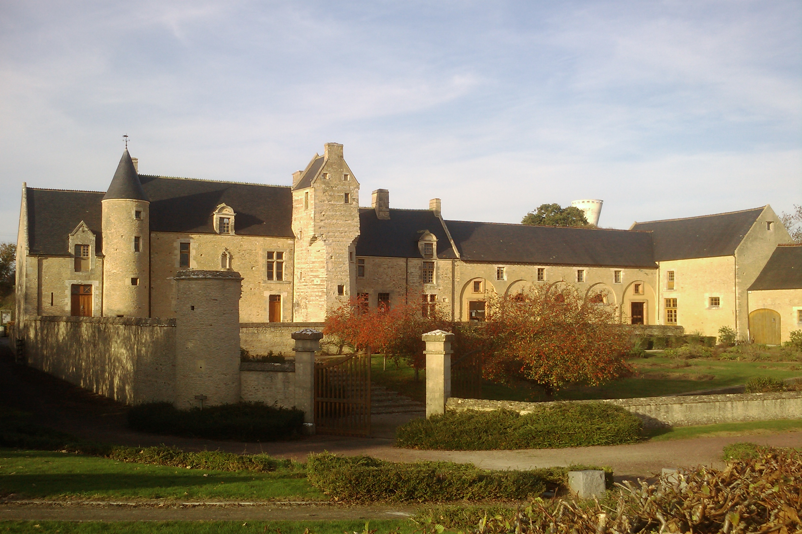 Manoir de Cantepie (XVIIe) aux Veys